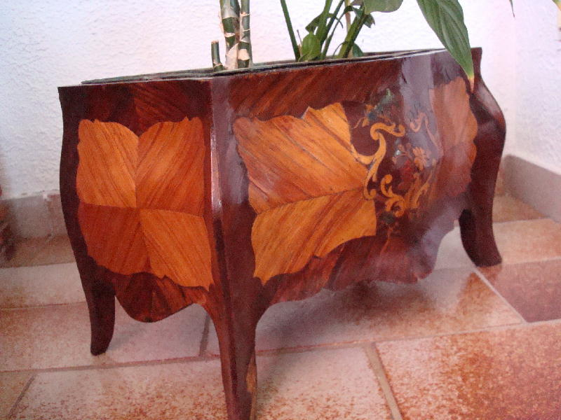 Jardinnière réalisée en marqueterie